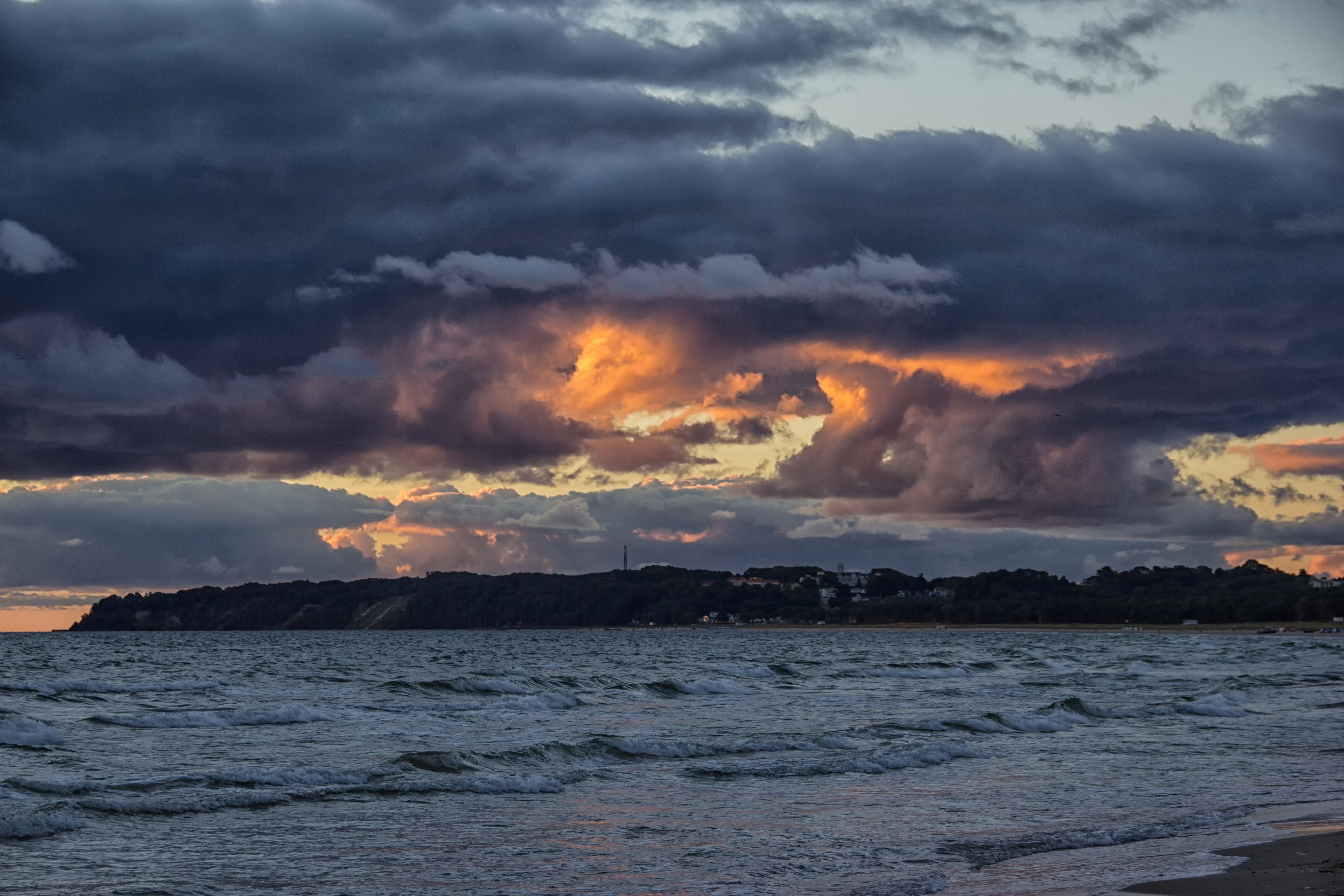 Blick auf das Nordperd im Morgenlicht, Göhren, Rügen, Naturschutzgebiet Mönchsgut, Biosphärenreservat Südost-Rügen, EU-Vogelschutzgebiet Westliche Pommersche Bucht, Biosphärenreservat, FFH-Gebiet Greifswalder Boddenrandschwelle und Teile der Pommerschen Bucht